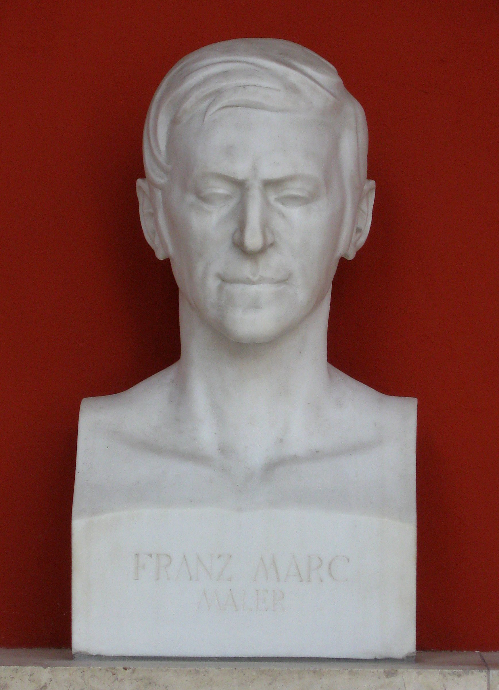 Büste von Franz Marc, Maler; Ruhmeshalle, München